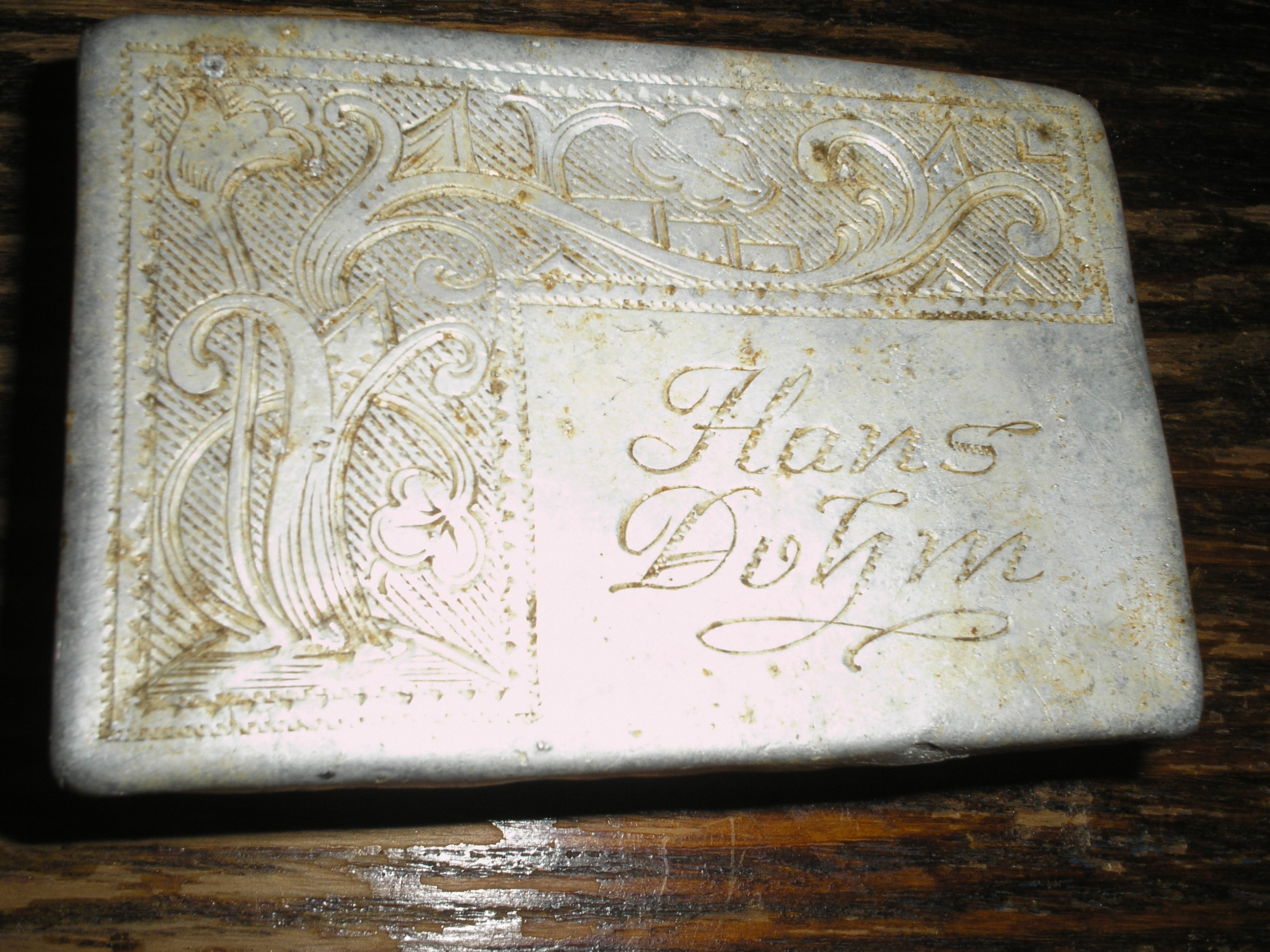 Именная коробочка аллюминивая, из под чего не известно.найдена мной при раскопках в лесах псковской области.